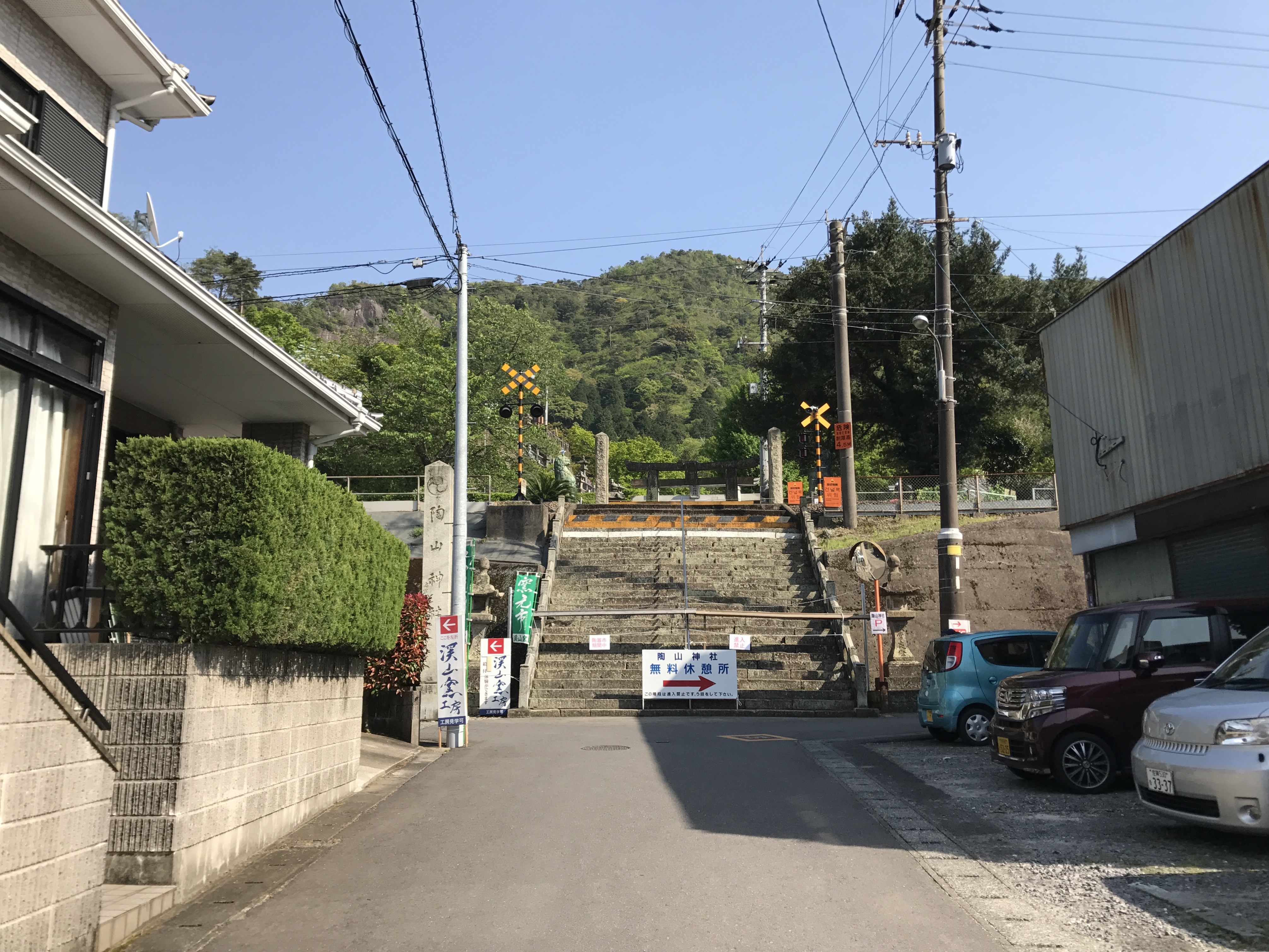 陶山神社の参道